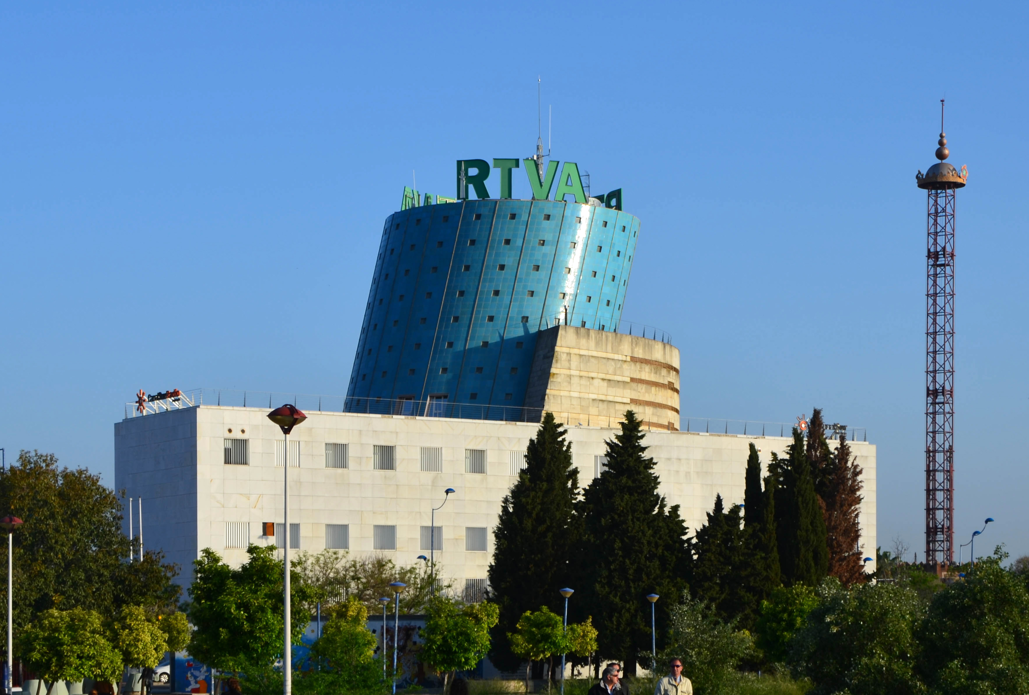 Siège de la Radio et Télévision d'Andalousie (RTVA), ancien pavillon d'Andalousie de l'Exposition universelle de 1992 de Séville (Espagne).